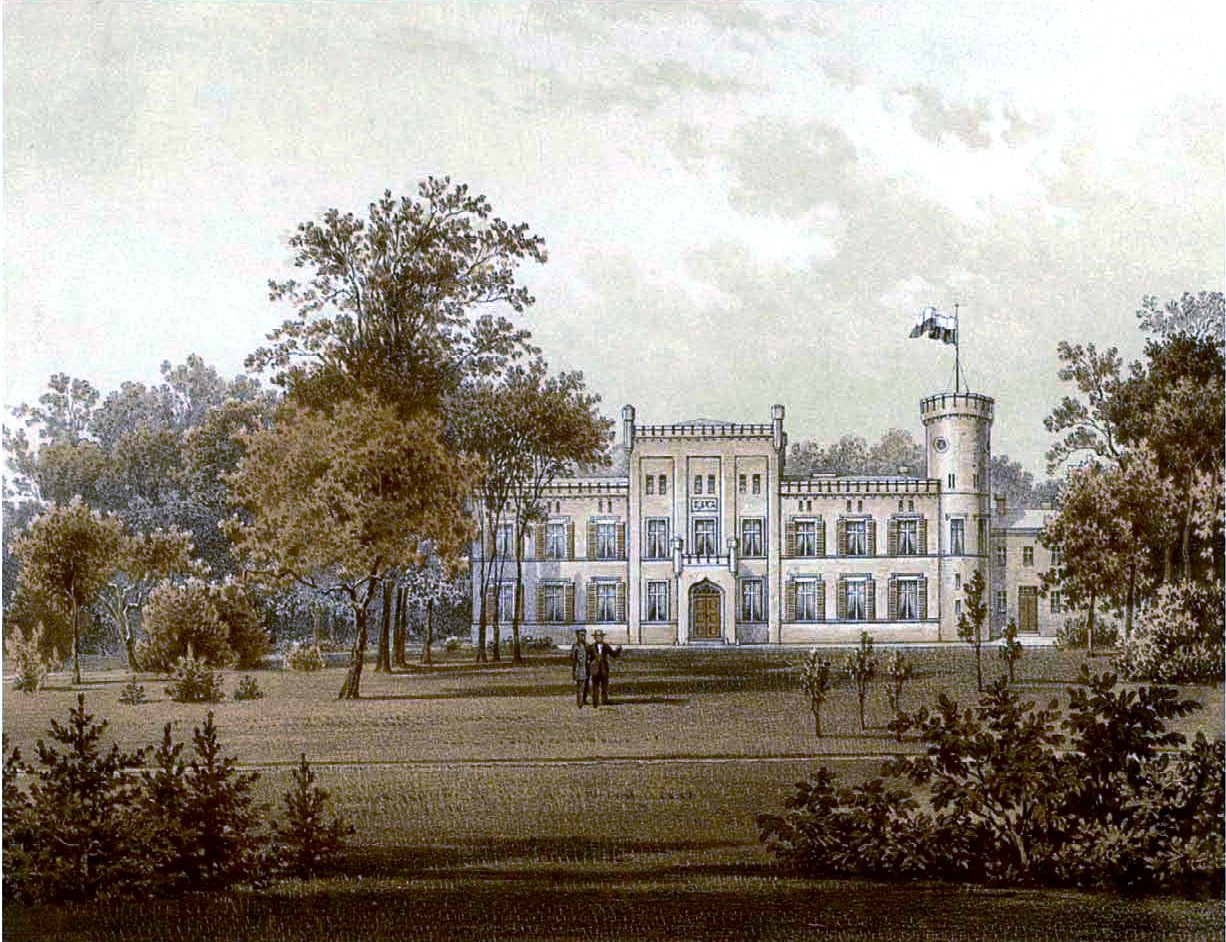 Schloss Kützkow, Lithographie von Alexander Duncker, 1869